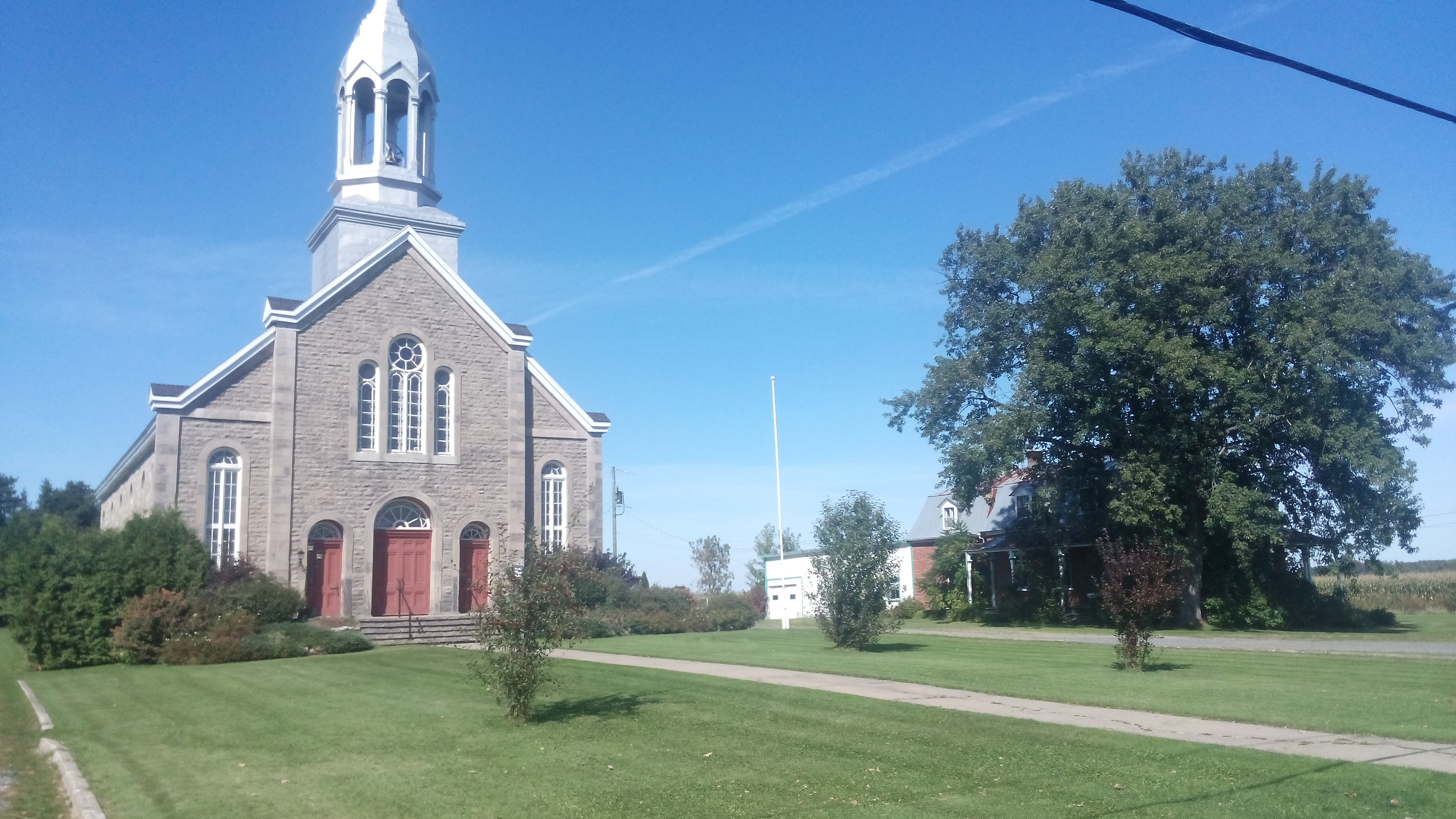 Église et presbytère de Très-Saint-Rédempteur